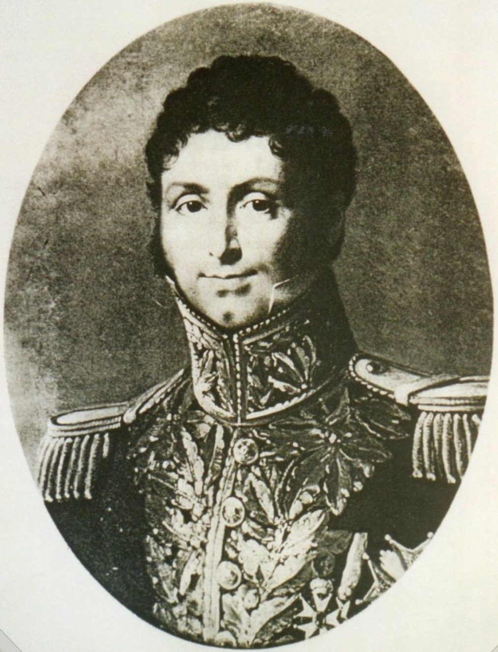 Pierre Wathier de Saint-Alphonse (1770-1846), général de division et comte de l'Empire.